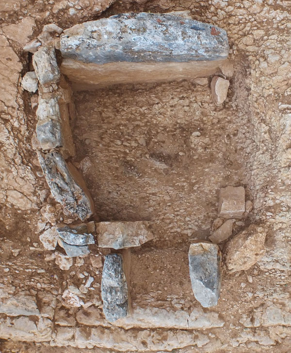 Vista cenital de la sepultura 7 de la necrópolis megalítica de Panoría (Darro, Granada)